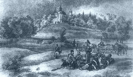 The French in the vicinity of Zvenigorod, 1812. Lithography of Albert Adam. 1820-ies Французы в окрестностях Звенигорода. Литография Альберта Адама, 1820-е гг.